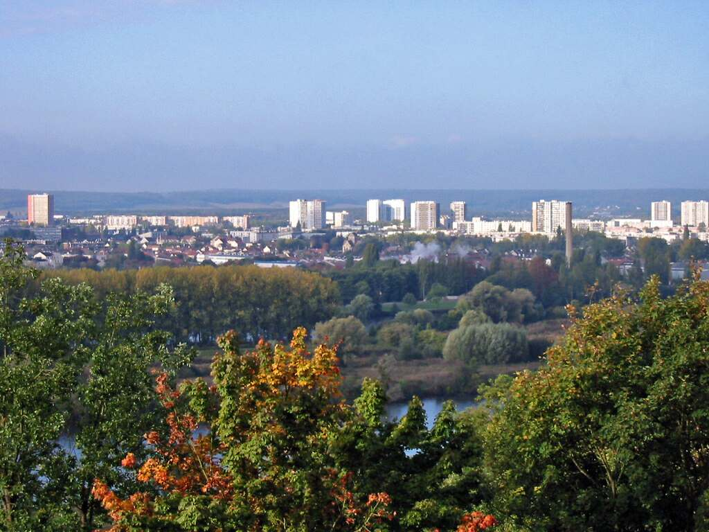 Le quartier du Val Fourré à Mantes-la-Jolie (Yvelines) Vue du chemin Saint-Sauveur à Limay Photo JH Mora, octobre 2005